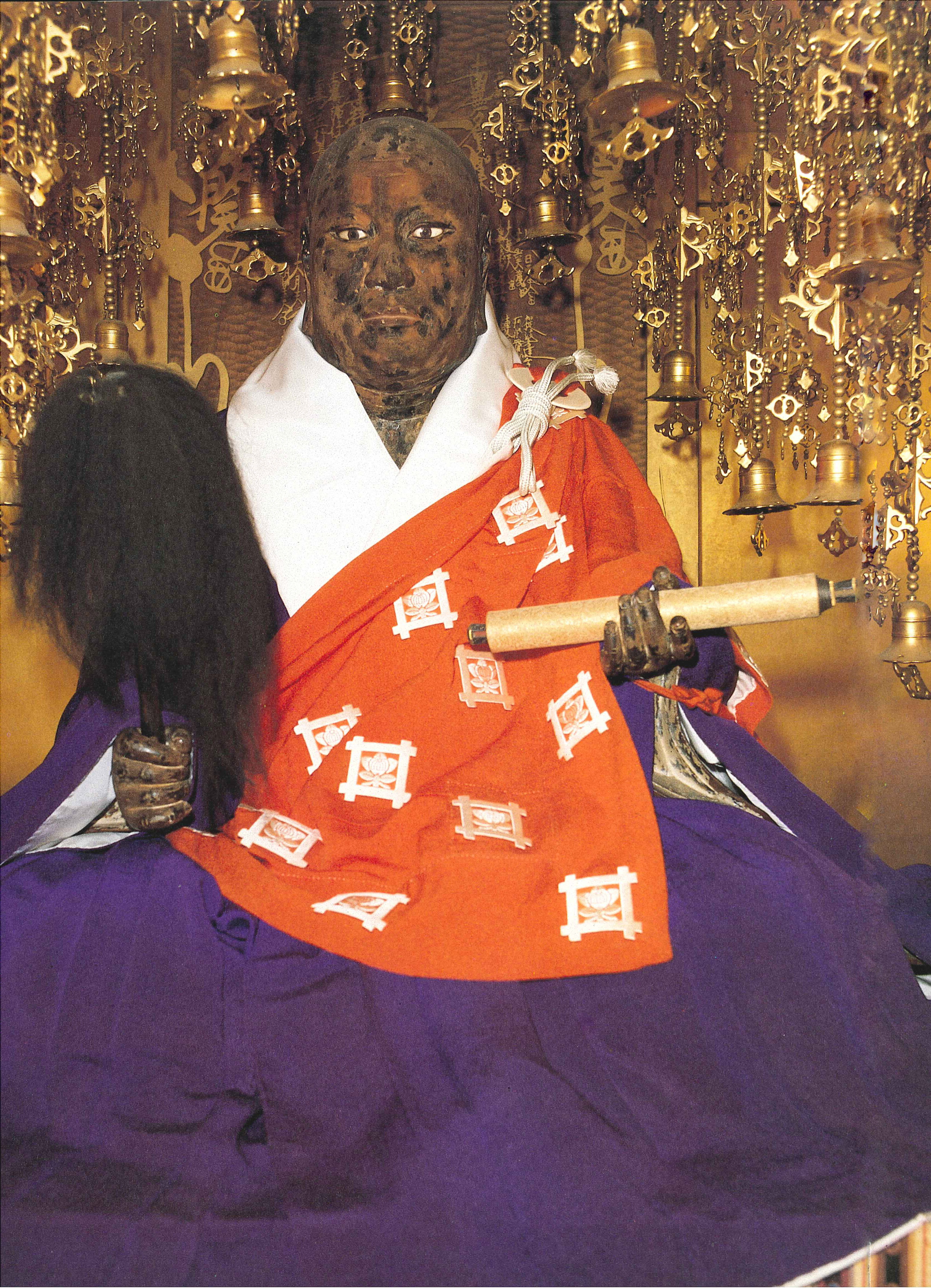 池上本門寺 御影 安置の樣子